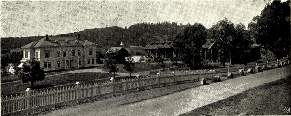 Storgården Østerhaug i Elverum kommune i Hedmark, Norge